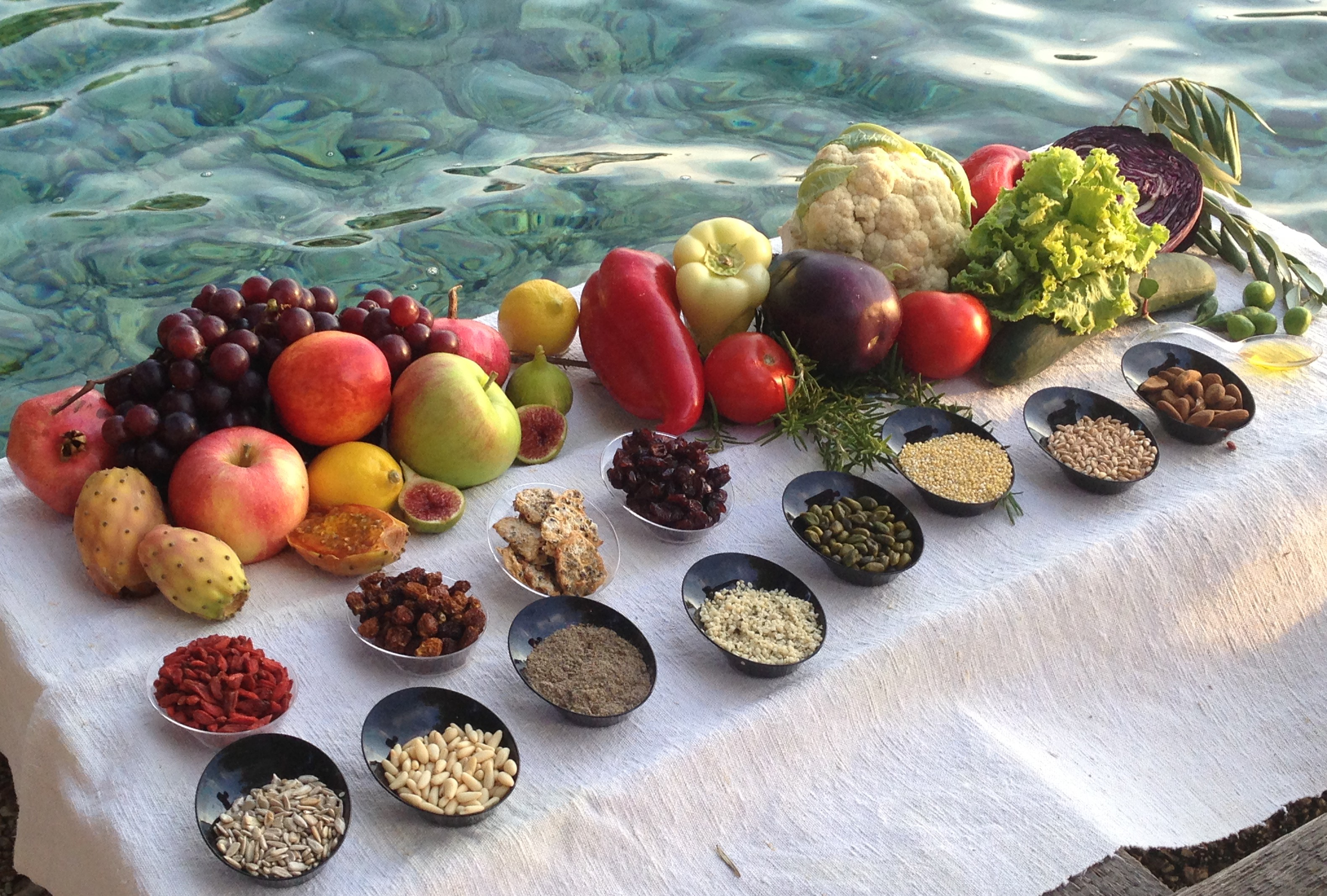 foto